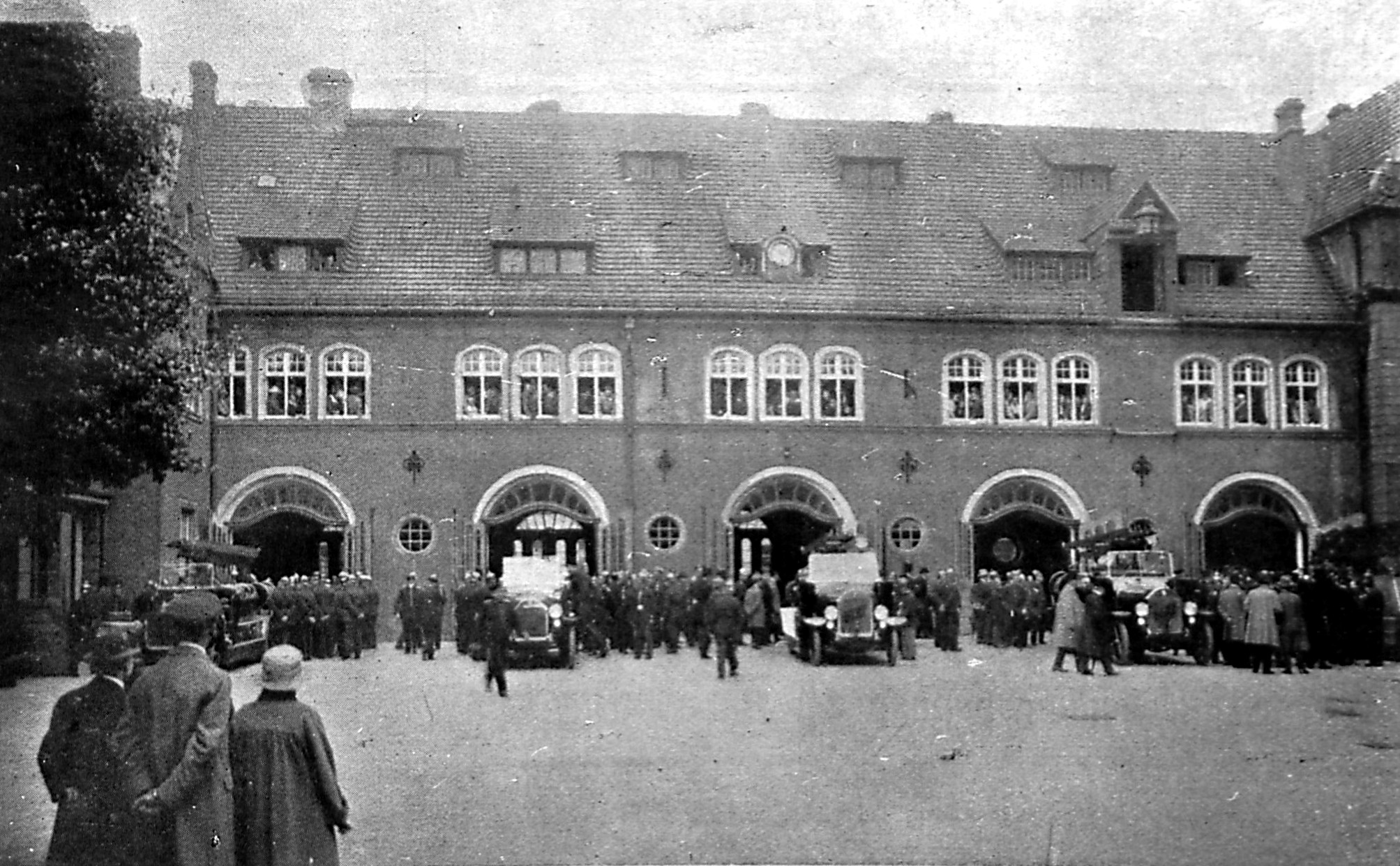 Übung auf dem Innenhof der Hauptwache am 1. Juli 1923. Gemeinsame Ausfahrt der Motorsorizten..